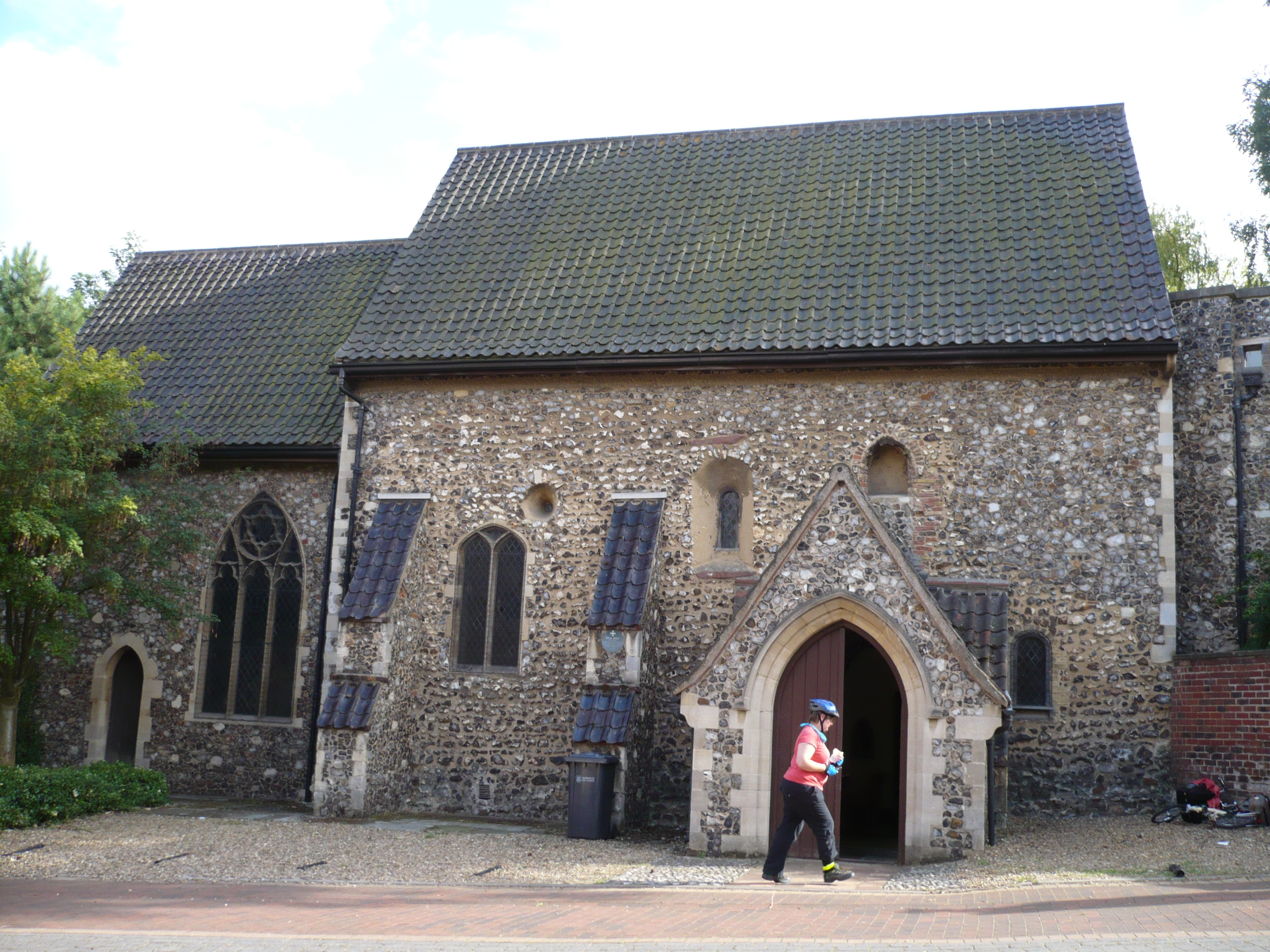 St. Julian's Church in Nowich